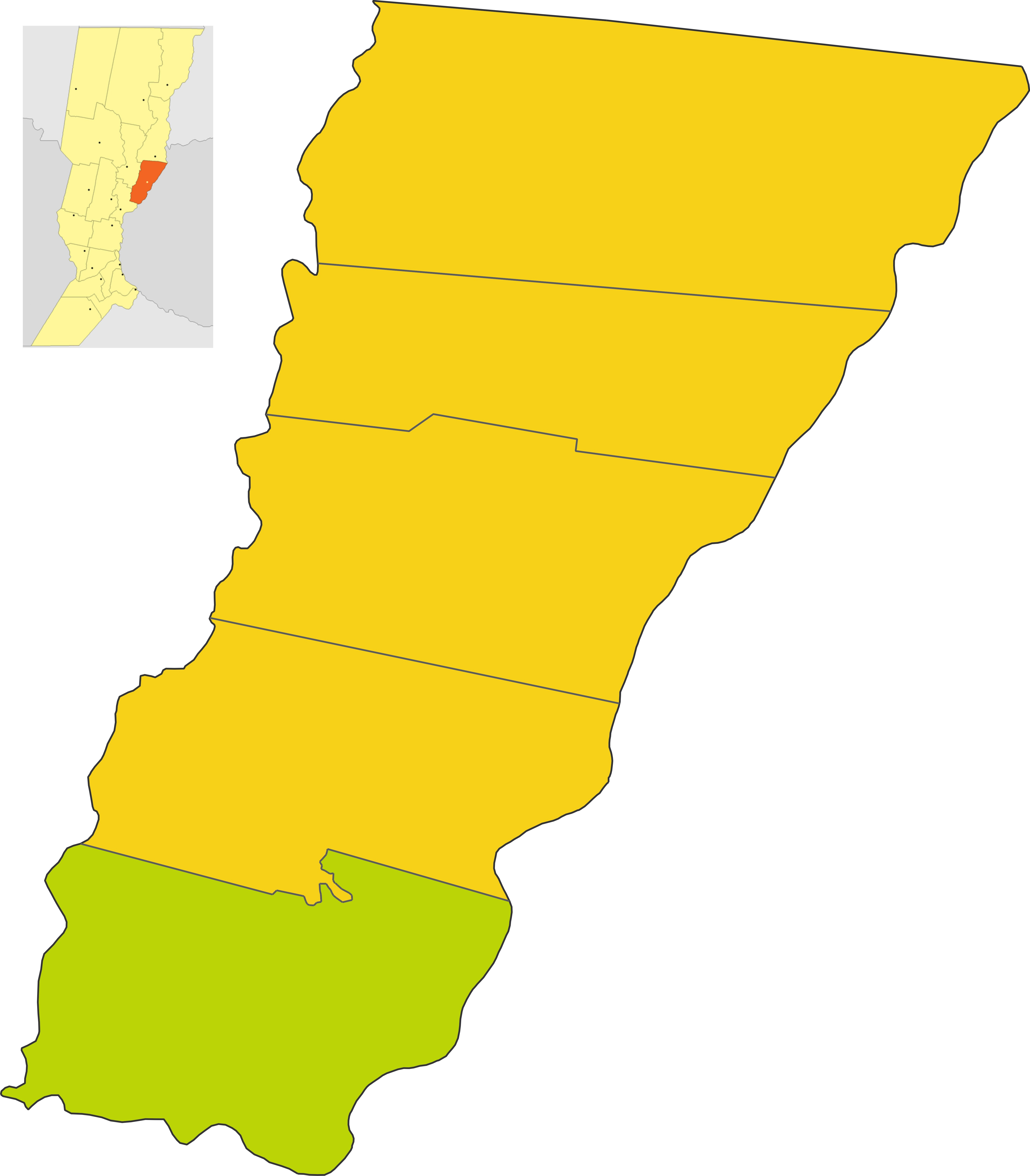 Map of the comuna de Santa Rosa de Calchines in Garay department, Santa fe province, Argentina